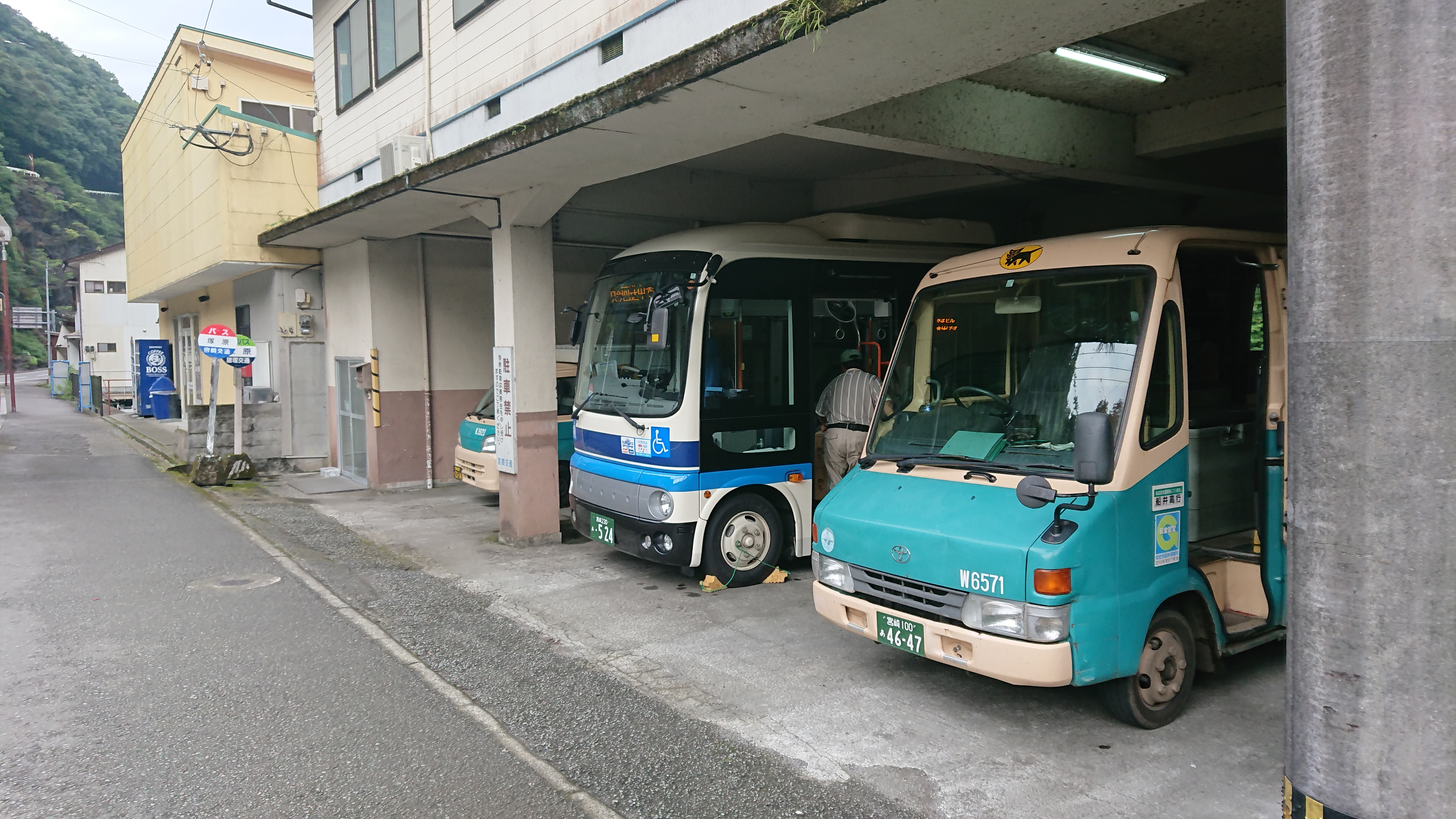 宮崎交通塚原車庫にてヤマト運輸から宮崎交通への貨物搭載作業